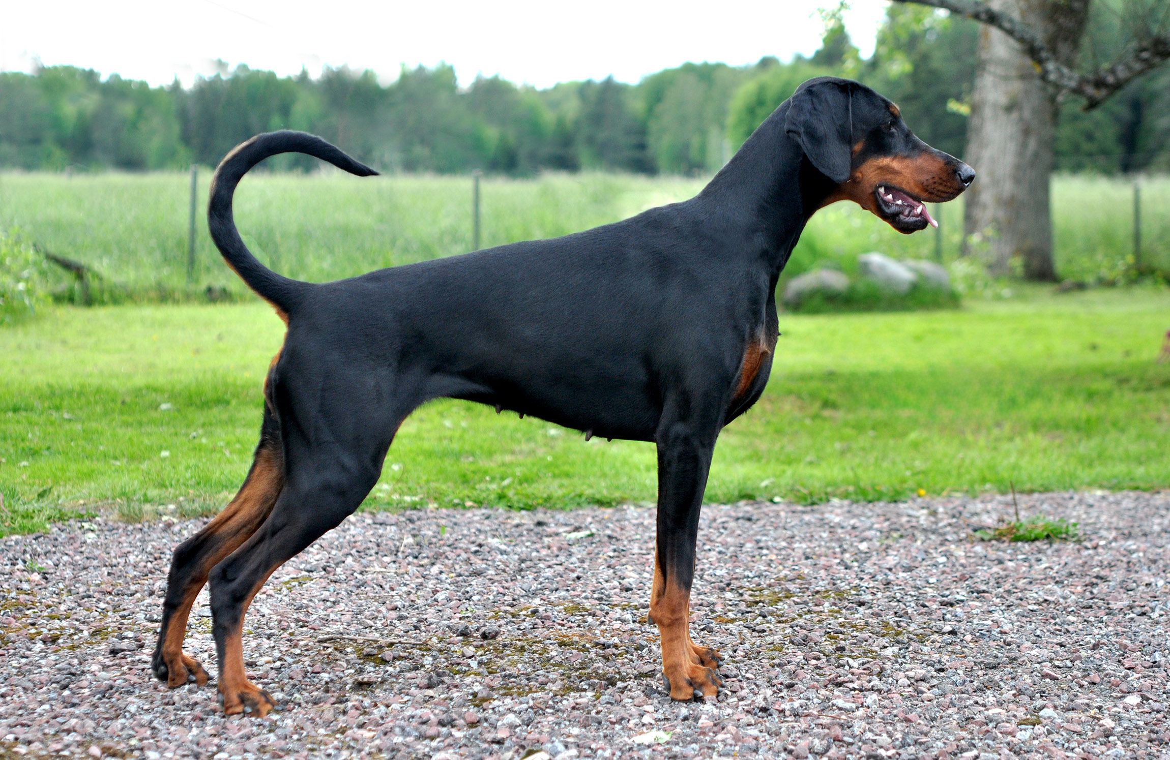 Jean Dark Snö of Sweden, dobermann